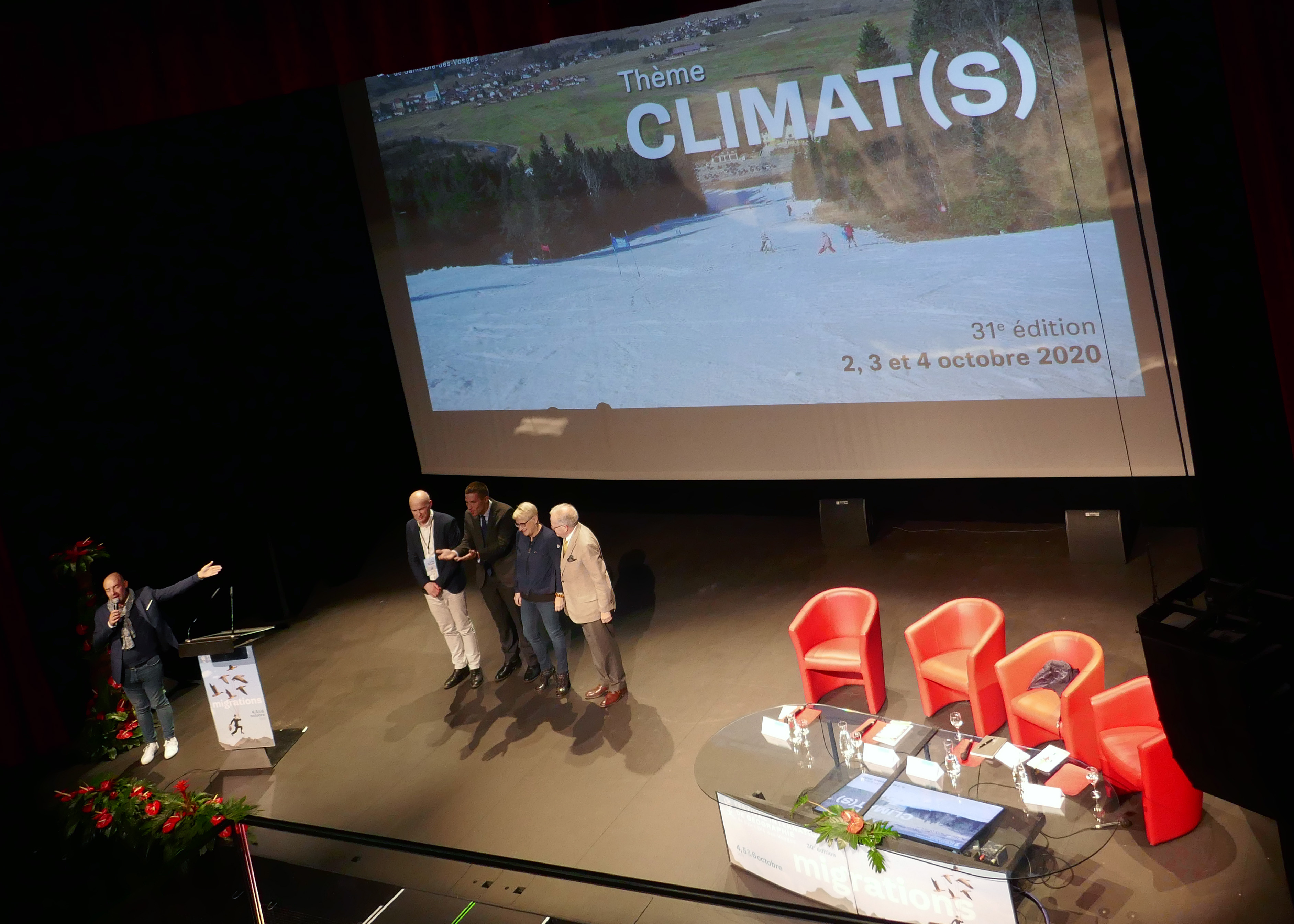 Cérémonie de clôture du 30e Festival international de géographie à Saint-Dié-des-Vosges (2019) et annonce du thème 2030.